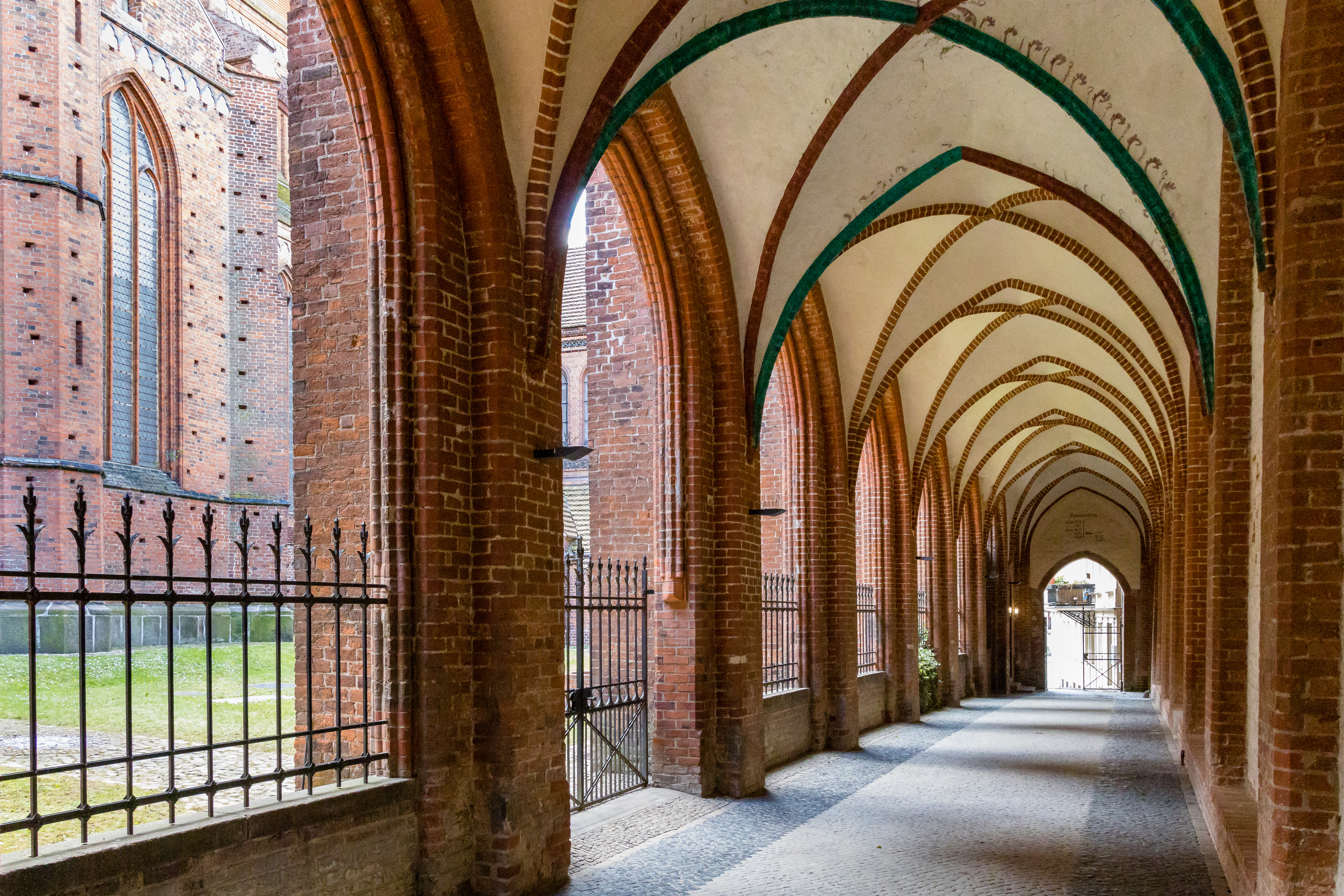 Schweriner Dom, Innenansicht, Arkaden mit Kreuzgewölbe, Mecklenburg-Vorpommern